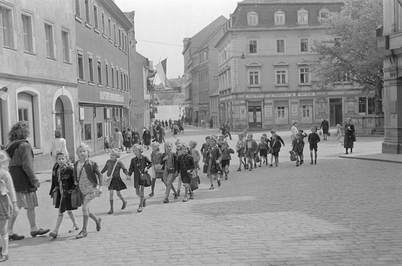 Original image description from the Deutsche FotothekPfingsten 1947